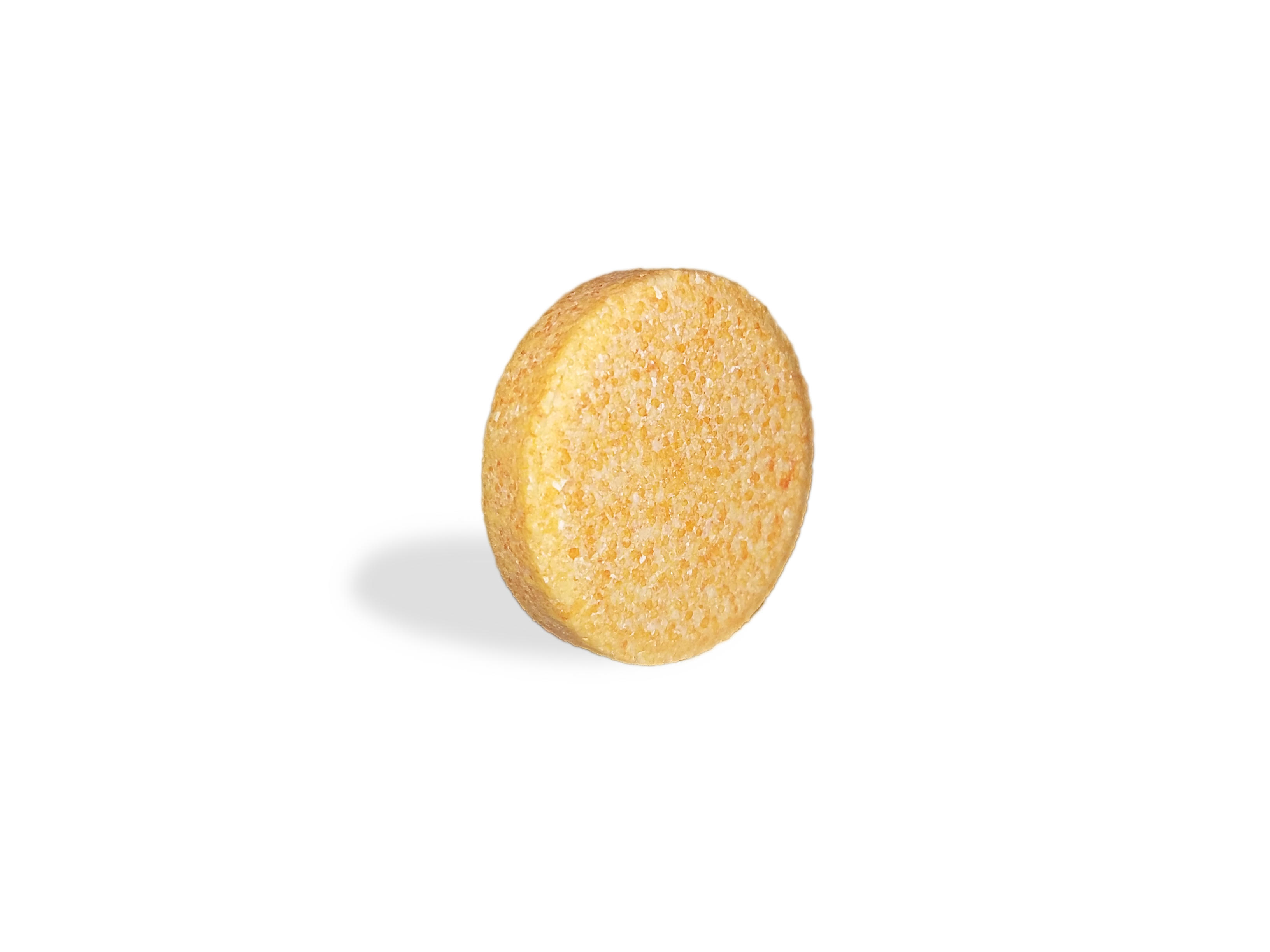 Viên sủi C.